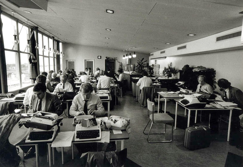 Journalisten aan het werk in het geïmproviseerde perscentrum tijdens de Eurotop op 23 en 24 maart 1981 in Maastricht. Het perscentrum bevond zich in het in 2003 gesloopte Stadskantoor aan de niet meer bestaande Stadhuisstraat (tegenwoordig Mosae Forum). Hier de kantineruimte op de bovenste verdieping. Fotocollectie RHCL Maastricht, GAM 26483.